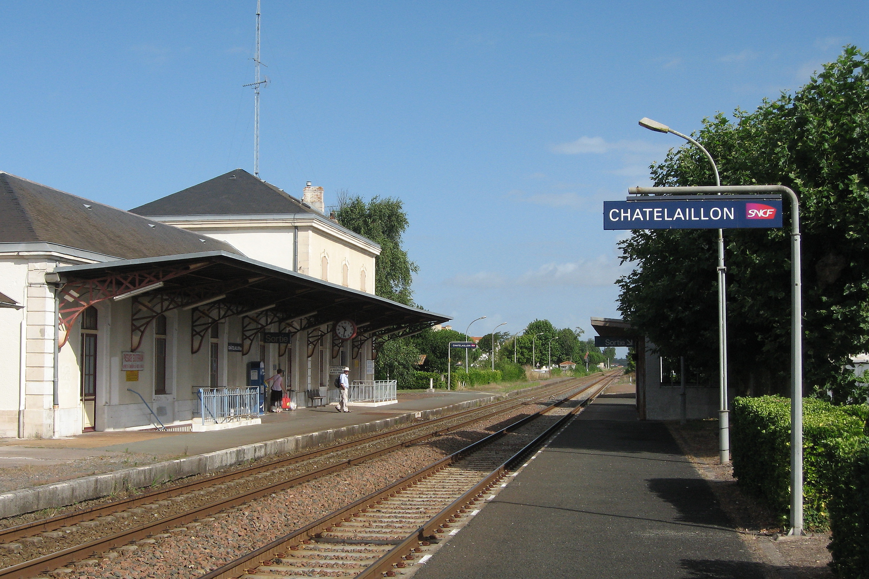 Vue des quais et du bâtiment voyageurs de la gare de Châtelaillon, en direction de Nantes.